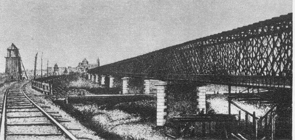 Foto del ponte sul Po inaugurato nel 1865.